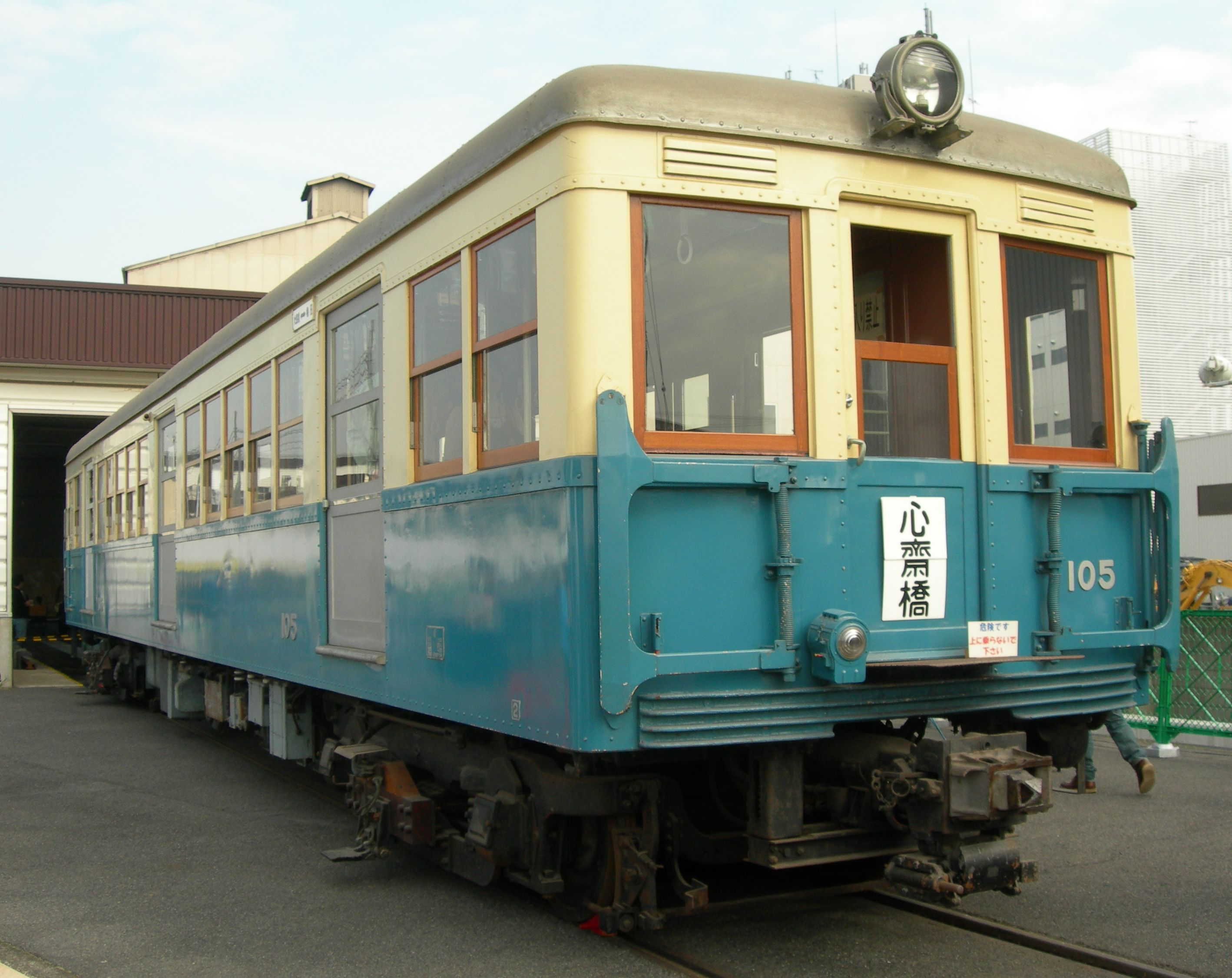 大阪市電気局100形電車105号